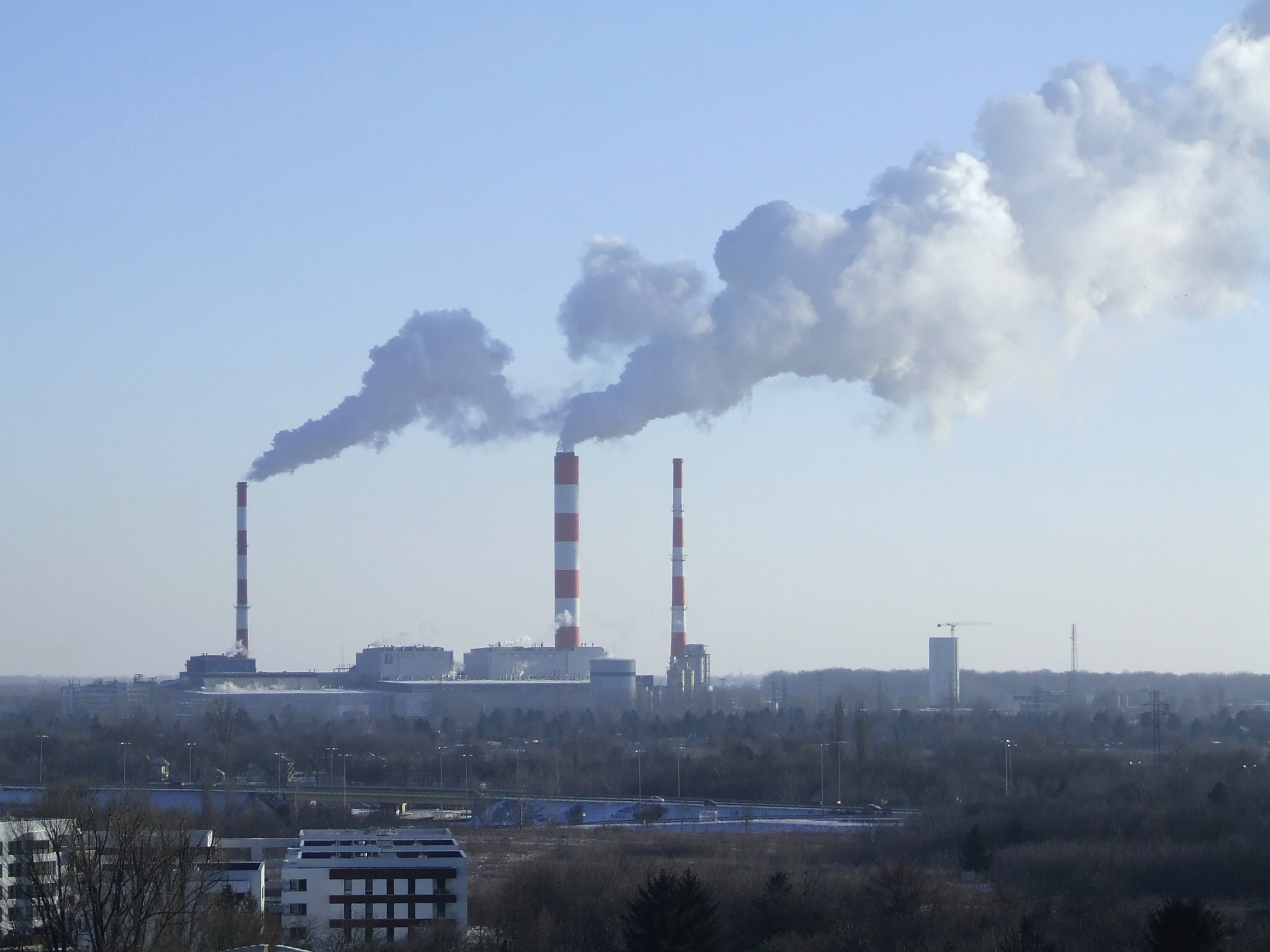 Elektrociepłownia Siekierki - dymiące kominy